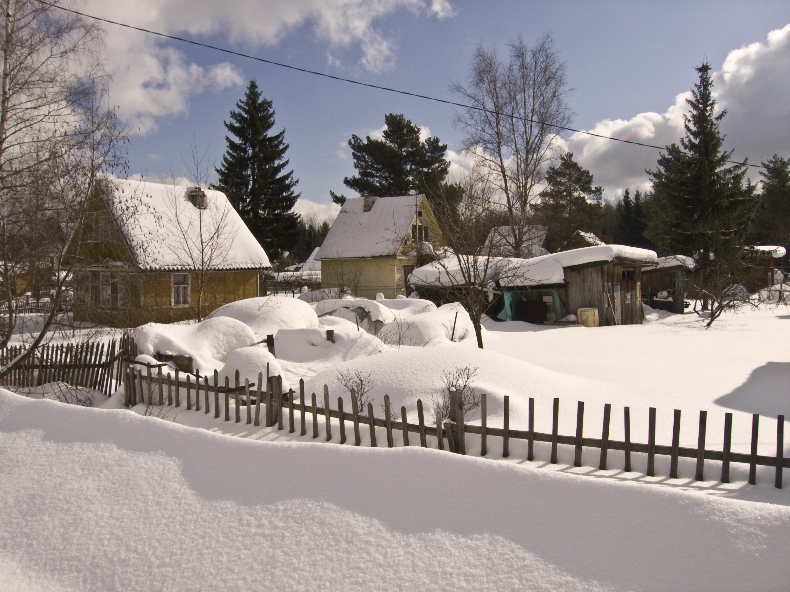 Winter in Mga